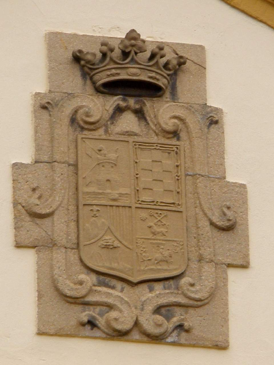 Conjunto de la Obra Pía, en Infiesto (Piloña, Asturias)